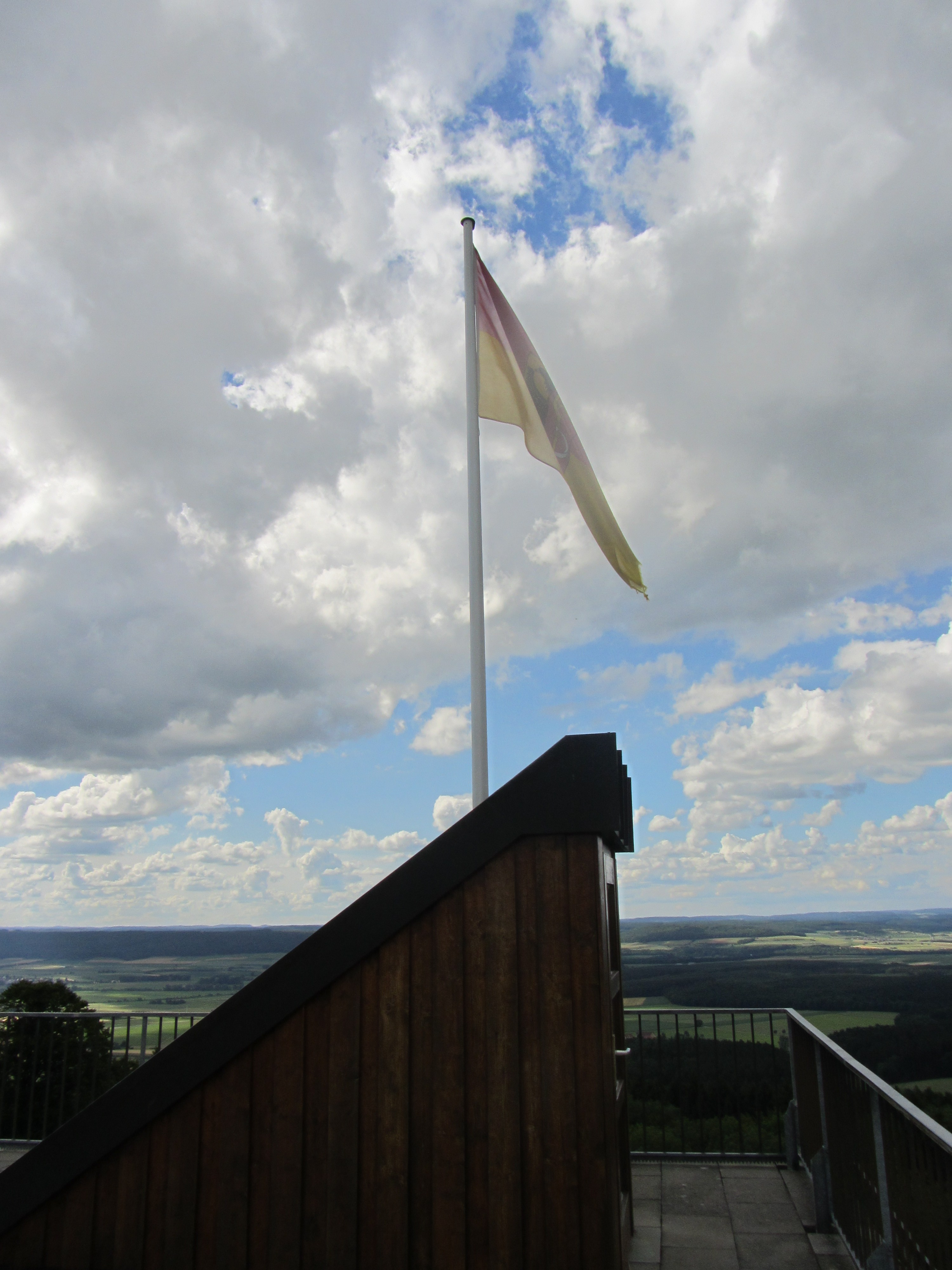 Fahne Landkreis Biberach auf der Burgruine - Blick Richtung Schwäbische Alb